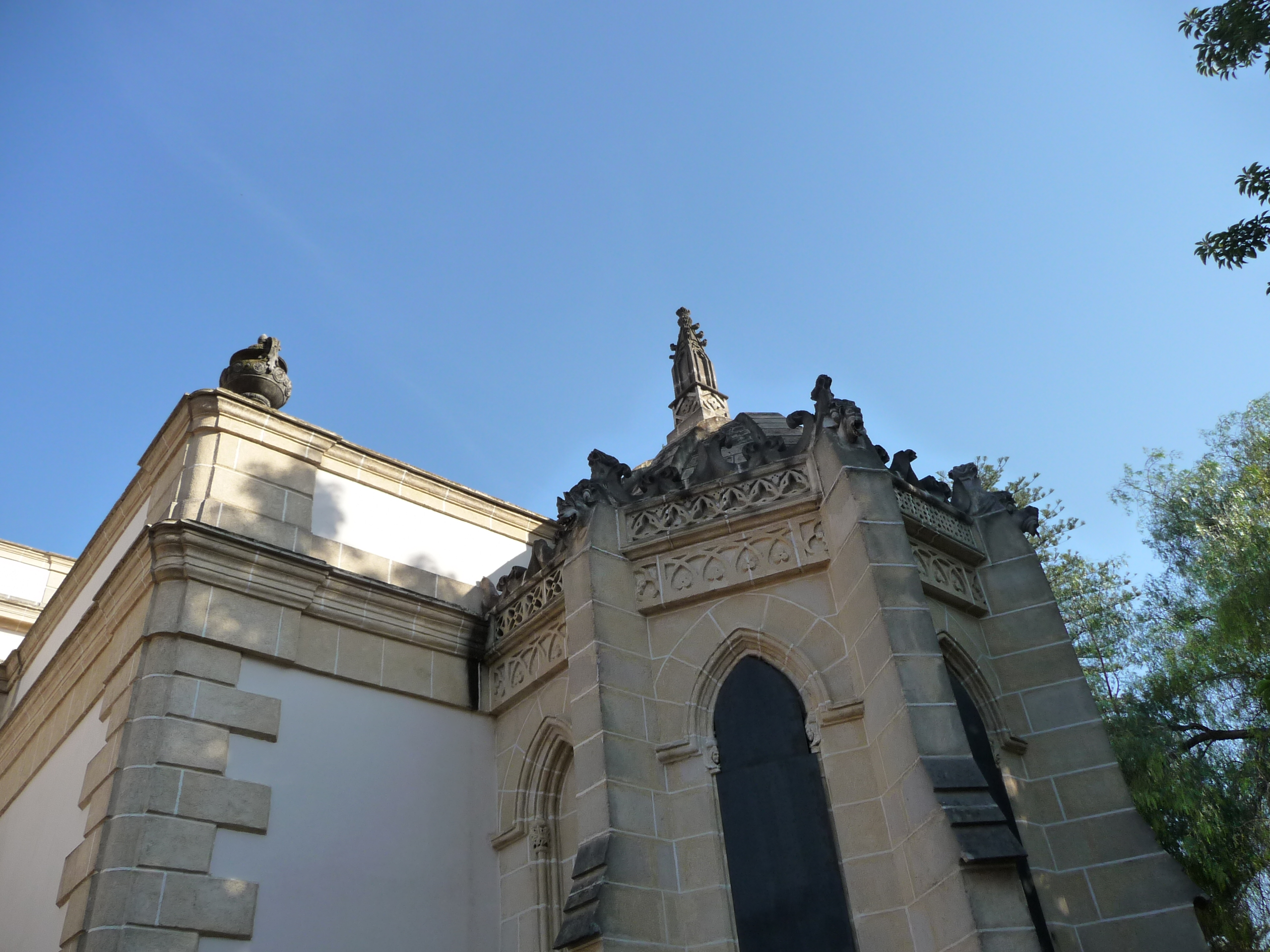 LaAtalaya-Jerez-p1020323.jpg